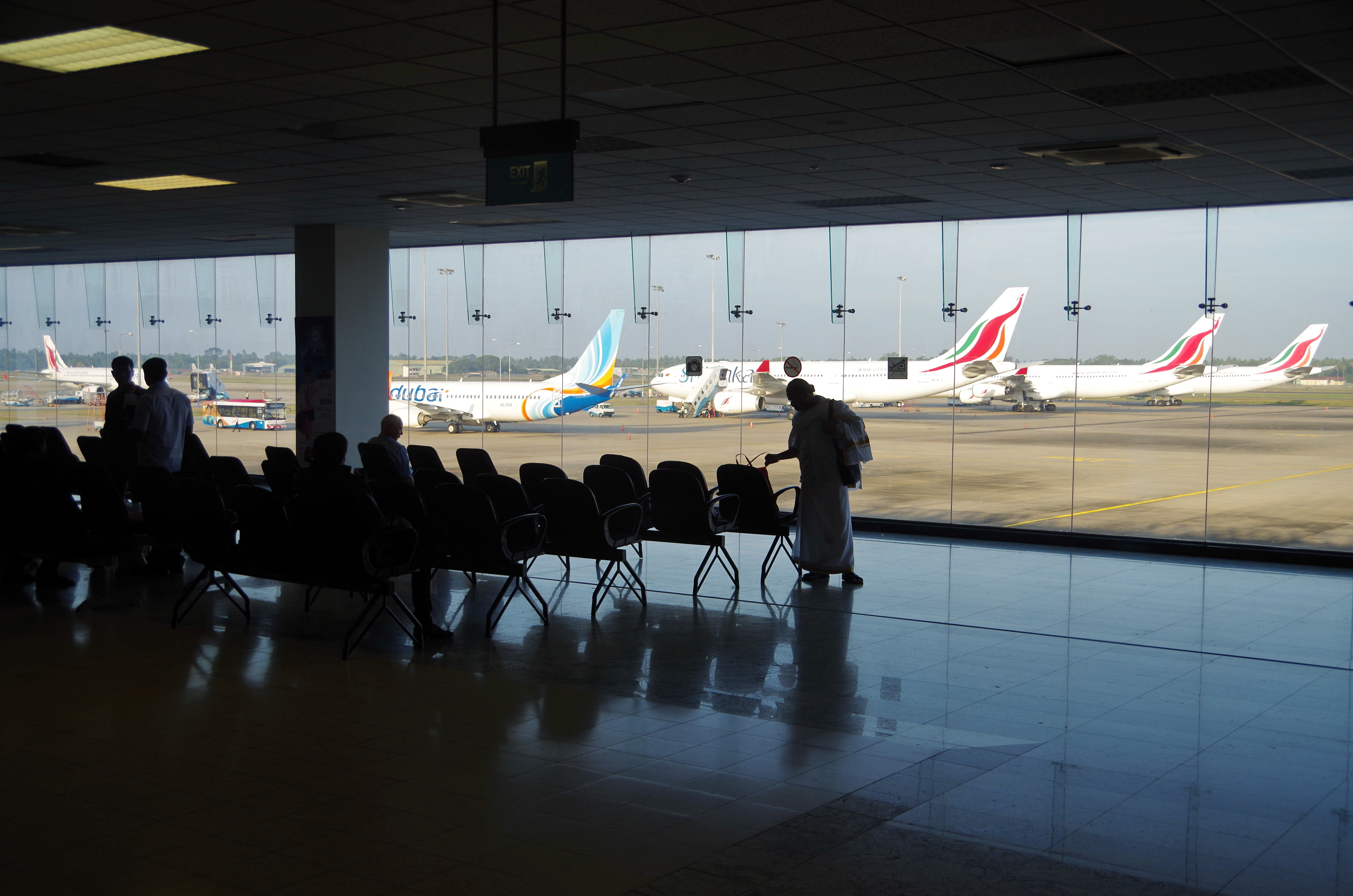 Blick vom Abflugbereich zum Vorfeld